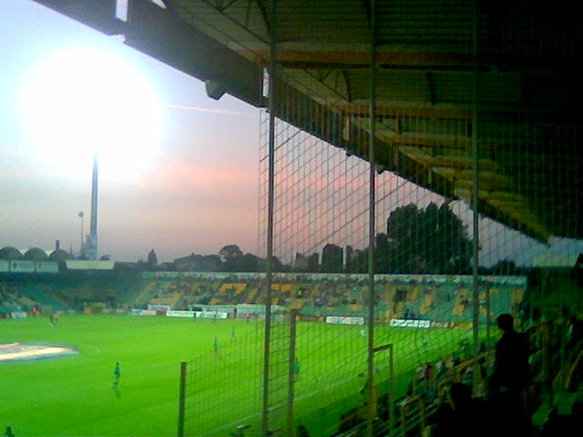 Górnik Łęczna Stadium, Poland